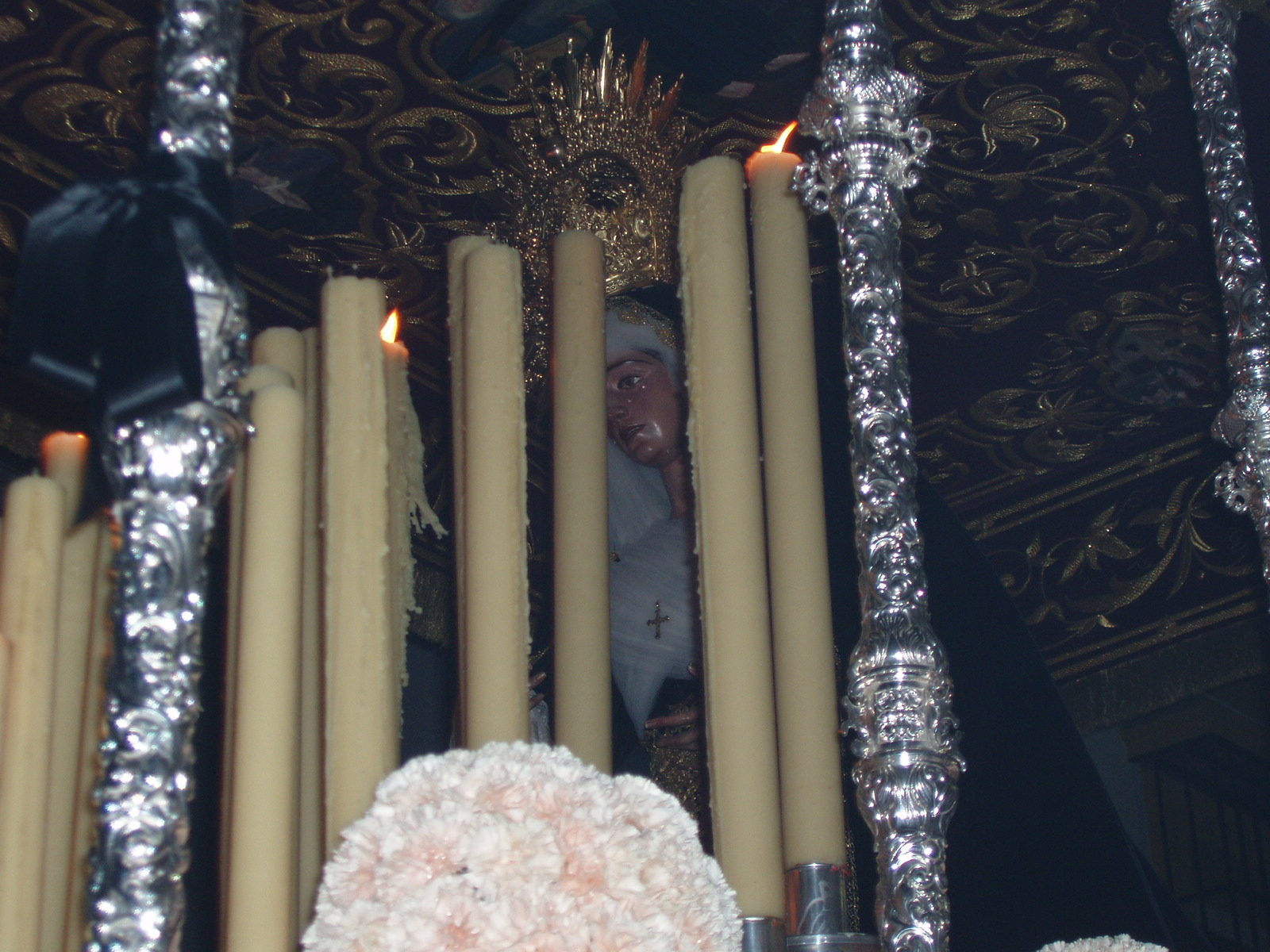 Los Afligidos, paso de palio con crespón. Lunes Santo. Semana Santa en El Puerto de Santa María, Cádiz, España.